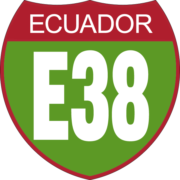 Disco de Identificación Ruta E38